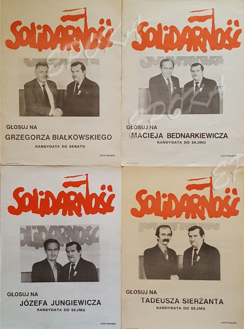 Grupa 4 plakatów wyborczych tzw. "Drużyny Lecha" z wyborów parlamentarnych w 1989 roku ze zdjęciami kandydatów z Lechem Wałęsą wykonanymi przez J. M. Goliszewskiego w dniu 11.05.1989 w czasie drugiej sesji zdjęciowej w Warszawie (zdjęcie grupy 4 plakatów wykonane przez J.M. Goliszewskiego pochodzi z archiwum autora).